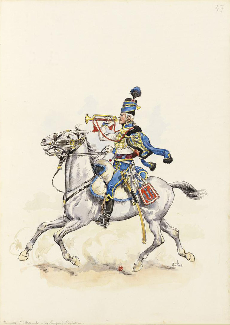 Trompette du 5e Hussards sous la première République.